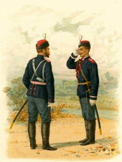 Отдельный Корпус Жандармов. Обер-Офицер и Вахмистр ( в парадной форме ) ( Приказ по воен. вед. 1897 г. № 185 )